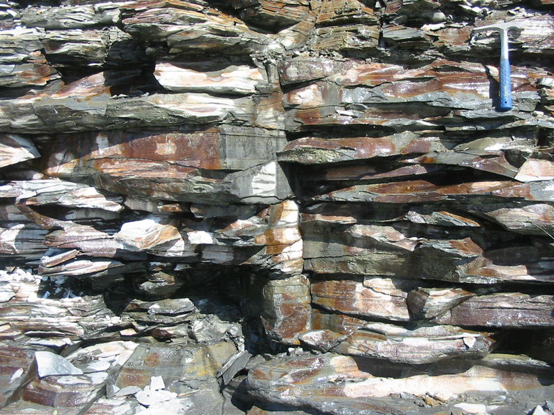 Graptoliitargilliidi kiht Pakri pangas (Türisalu kihistu).